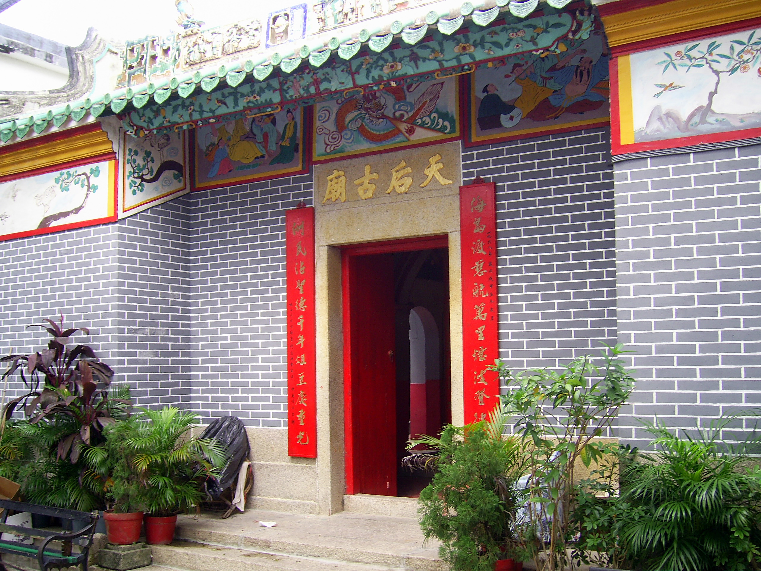 中文（香港）: 長洲北社天后廟